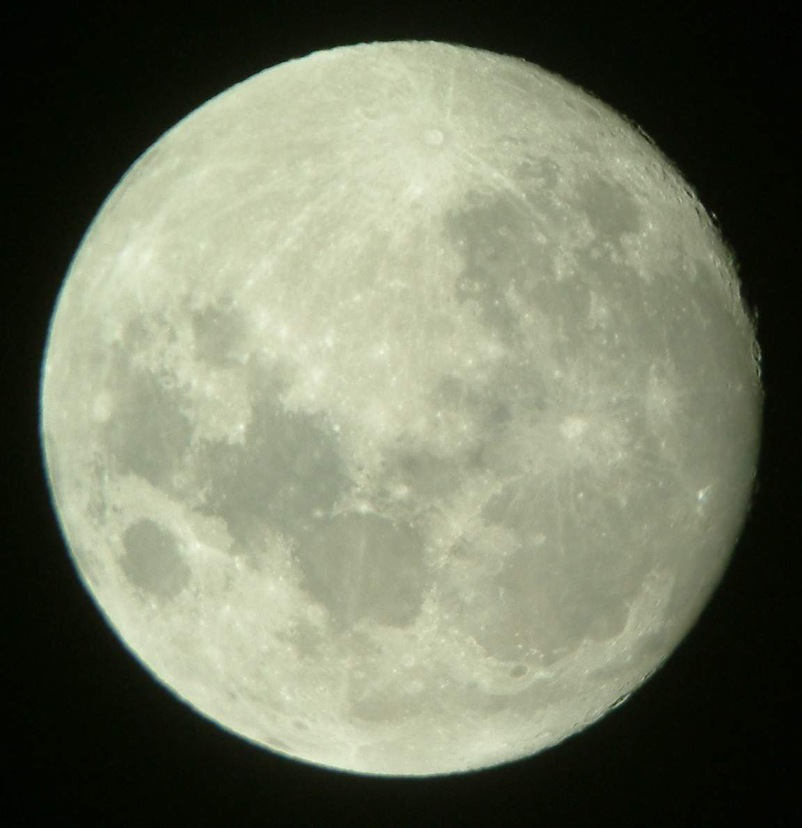 réalisée par Yves